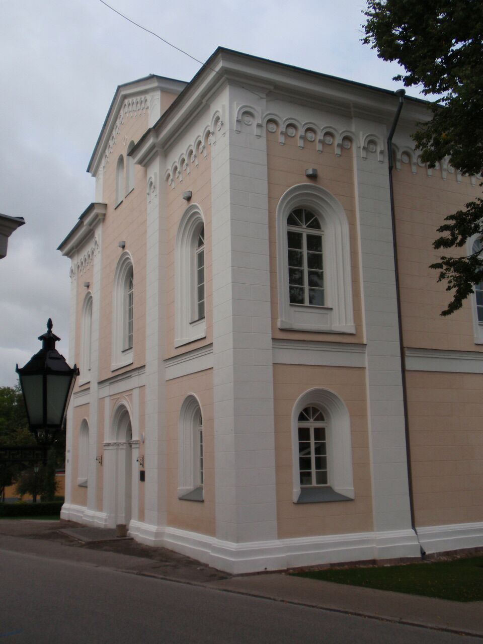 End. ülikooli kiriku hoone Jakobi 1, 1857-1860.a.